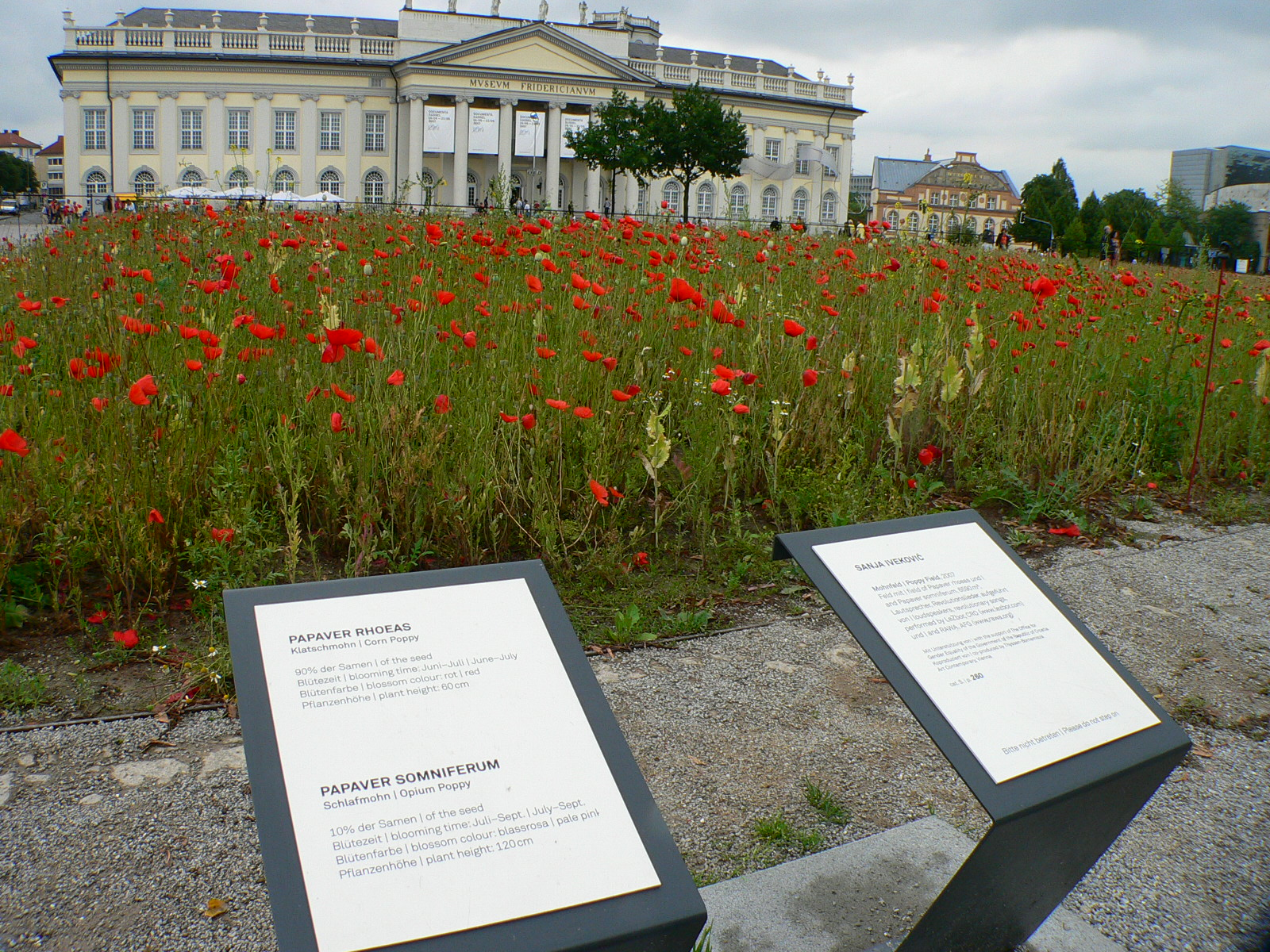 Documenta 12 in Kassel: Mohnfeld auf dem Friedrichsplatz, im Hintergrund das Fridericianum